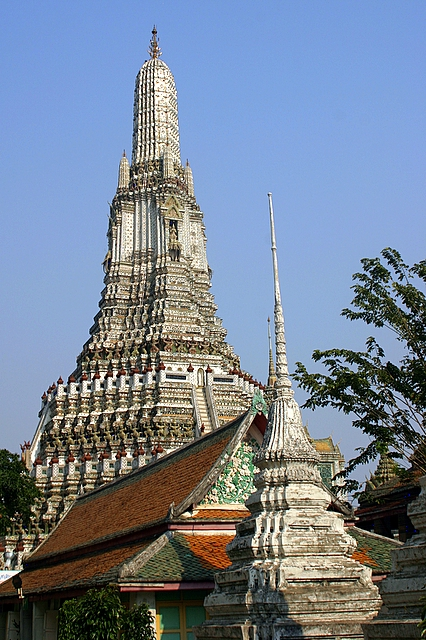 Temple detail at Wat Arun, Bangkok, Thailand